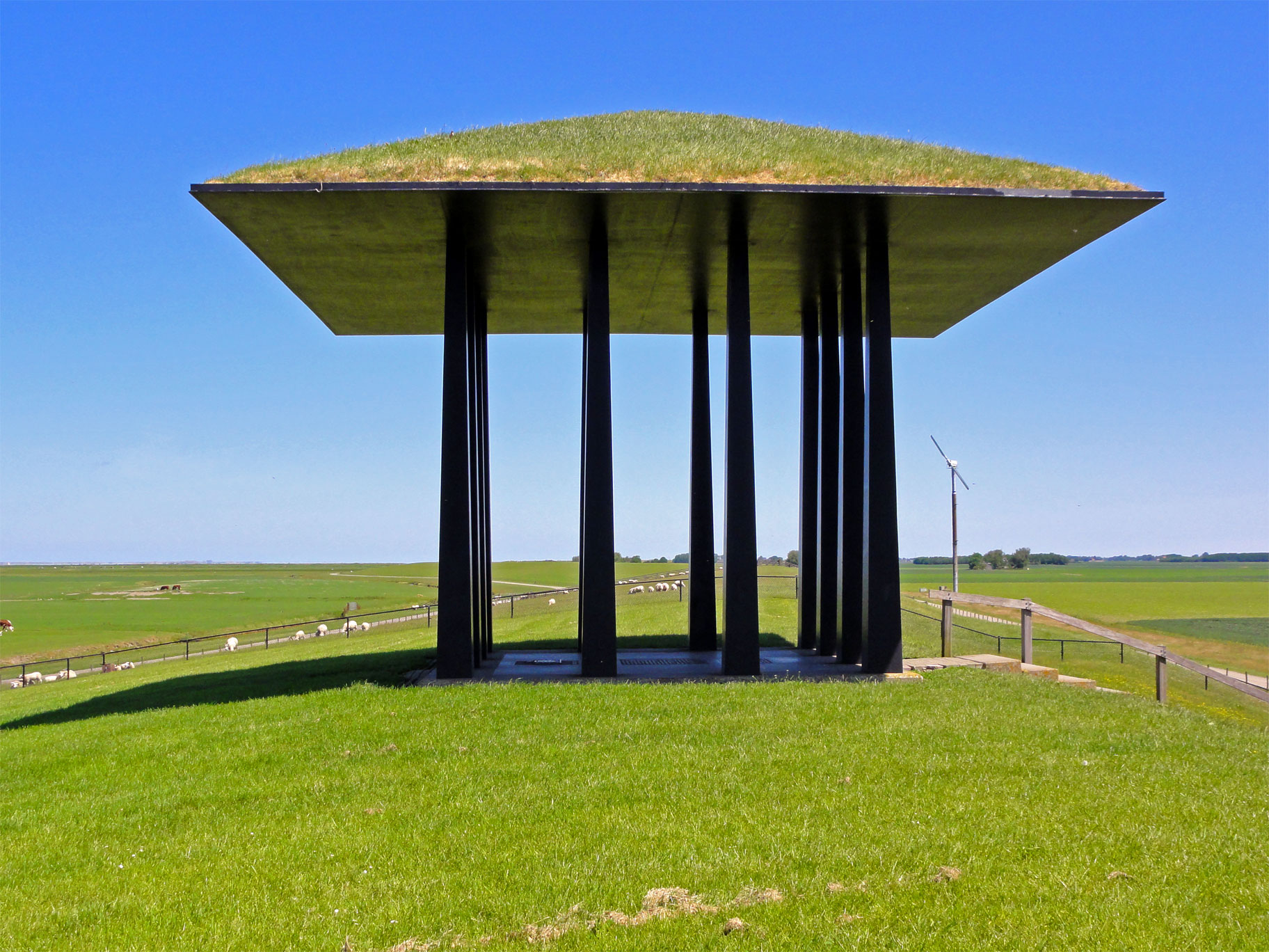 Monument ter herinnering van het op deltahoogte brengen van de Friese zeedijken; monument gemaakt door Ids Willemsma